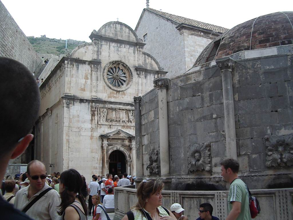 Font i iglesia a la Ciutat vella (old city) de Dubrovnik